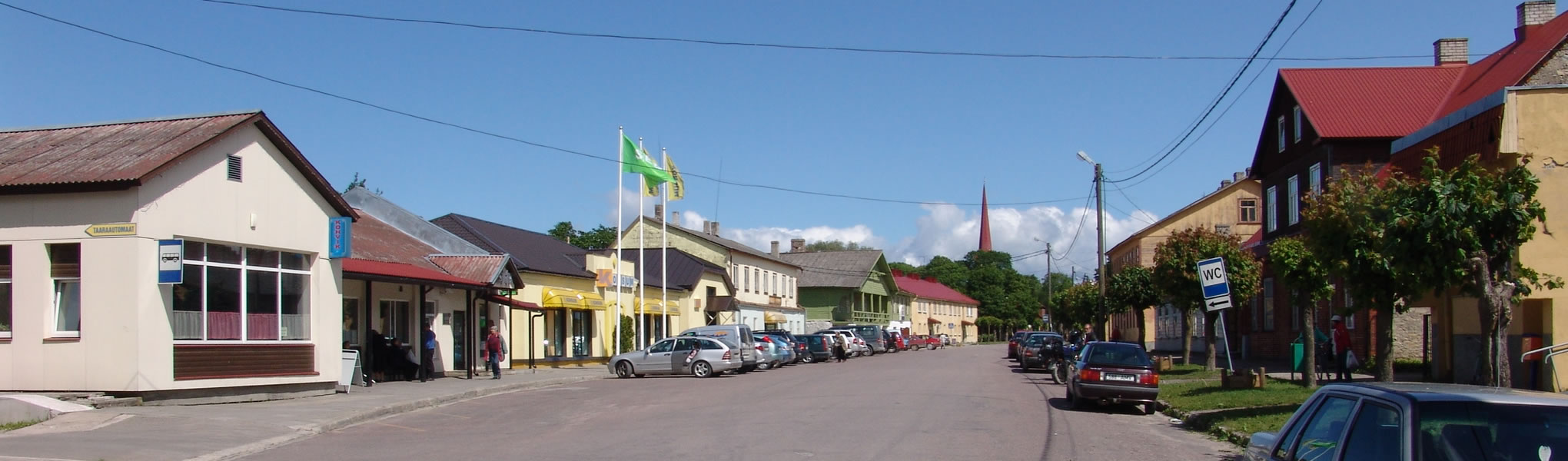 Hauptstraße von Lihula (Estland)